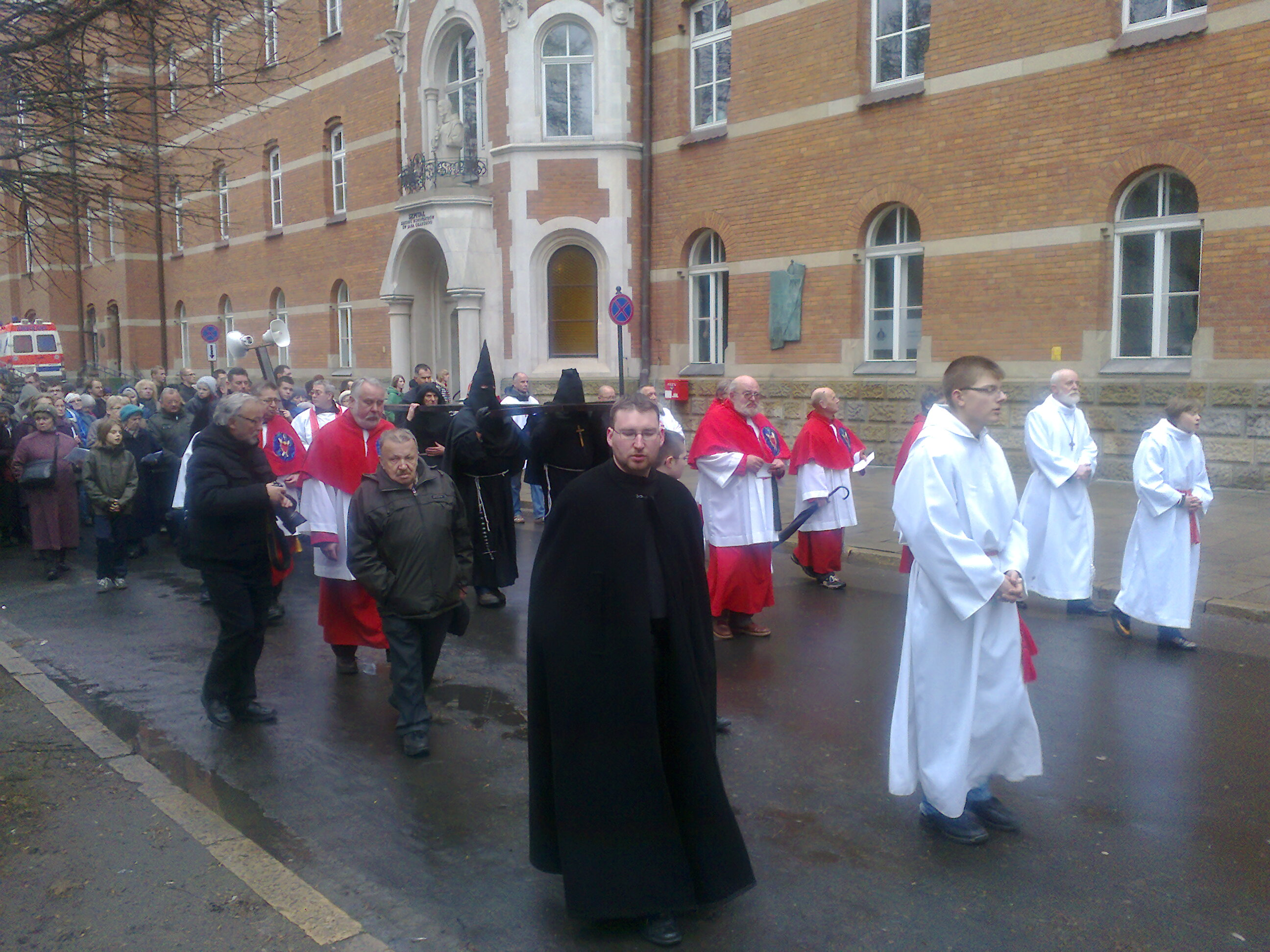 Droga krzyżowa Kazimierz